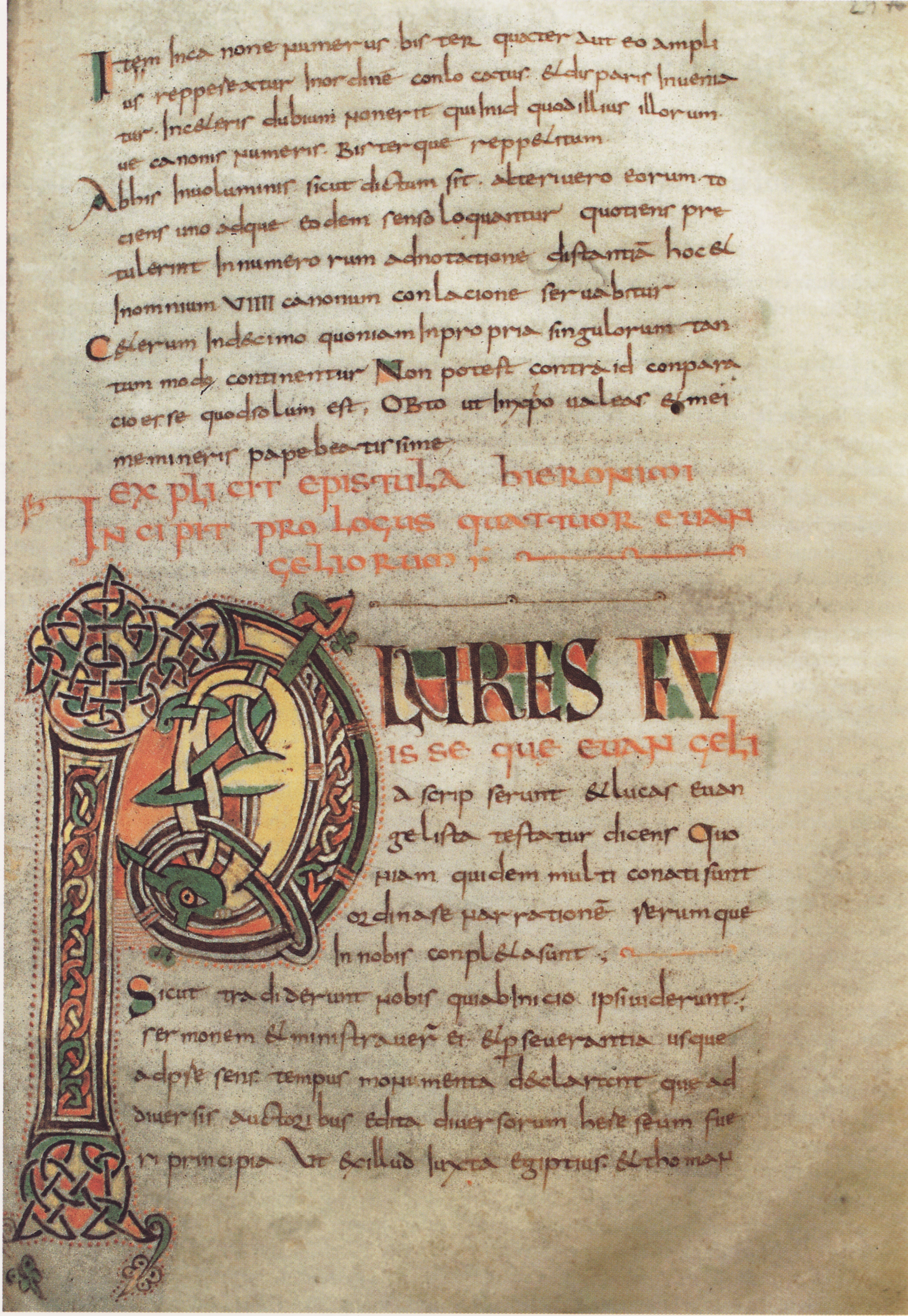 Blatt 16r der Handschrift Domschatzkammer Hs.1, datiert auf um 800